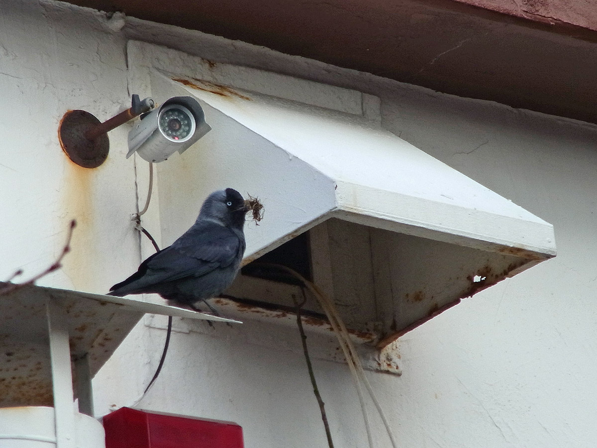 Dohle mit Nistmaterial an einem Nistplatz in Büsum / Deutschland